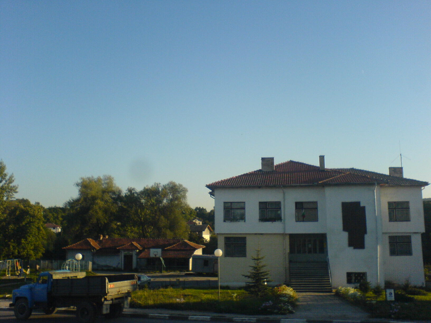 village Aldomirovci, Bulgaria